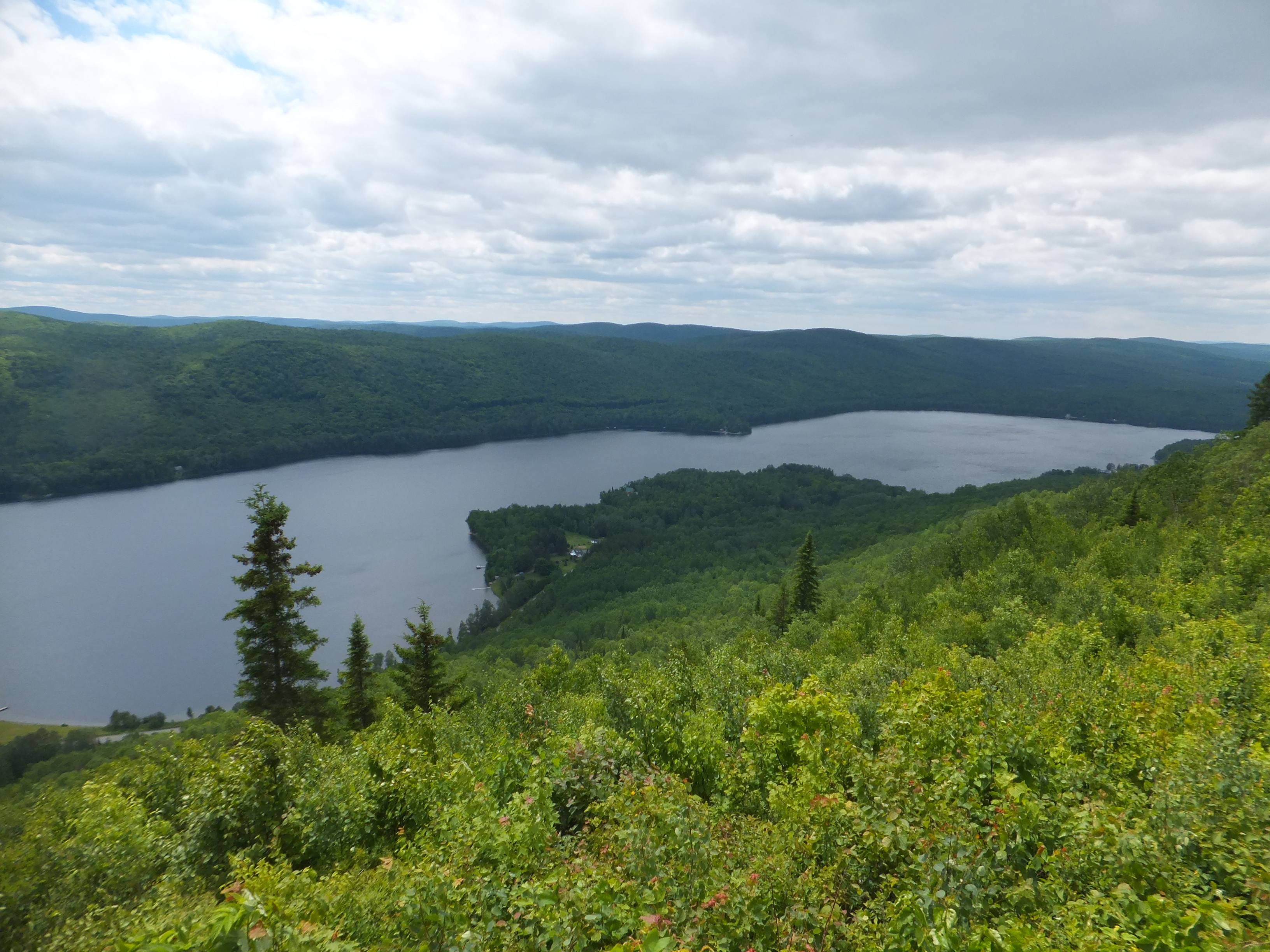 Lac Meruimticook du sommet de la Montagne Comeau.